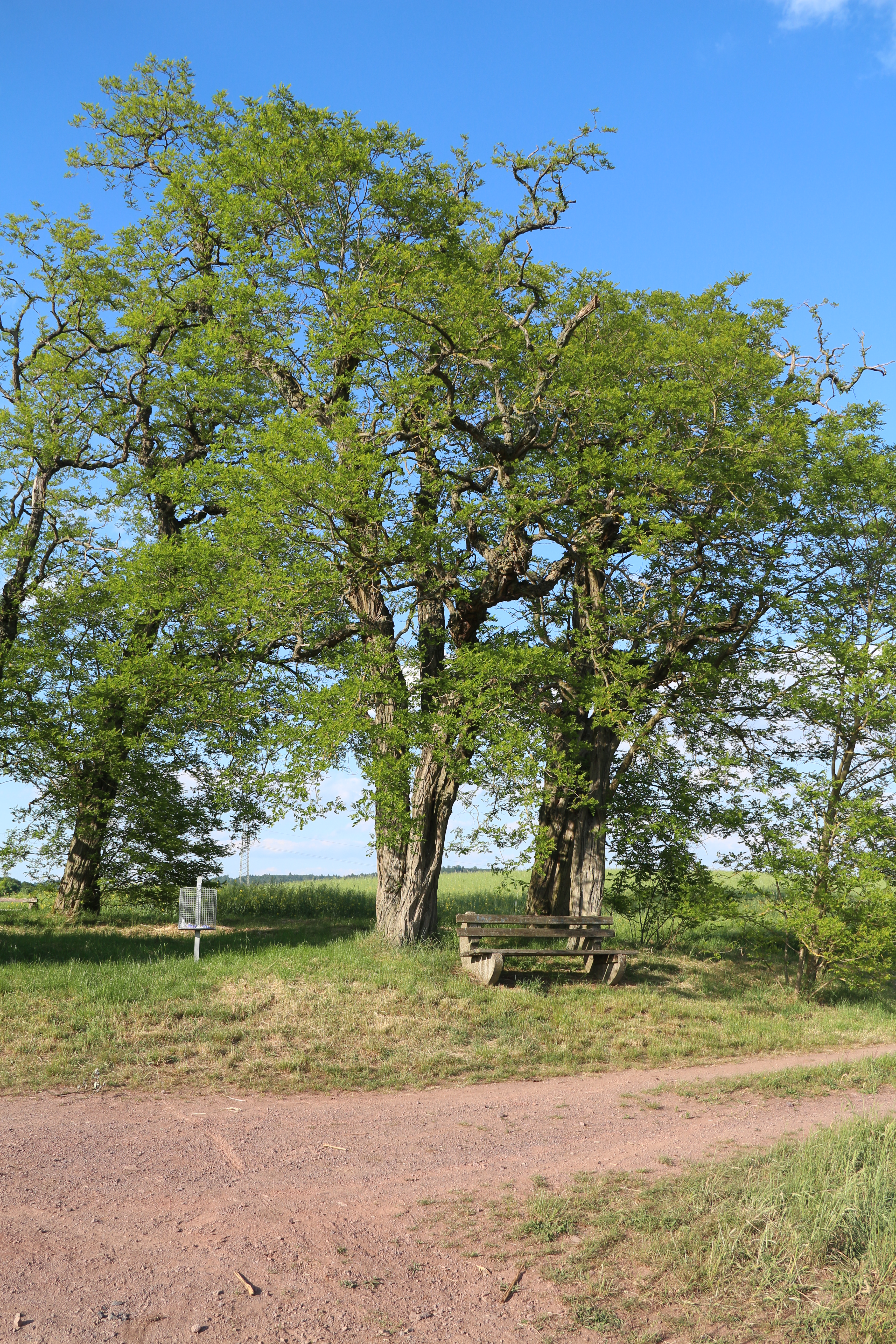 Oberweimar (Hessen)